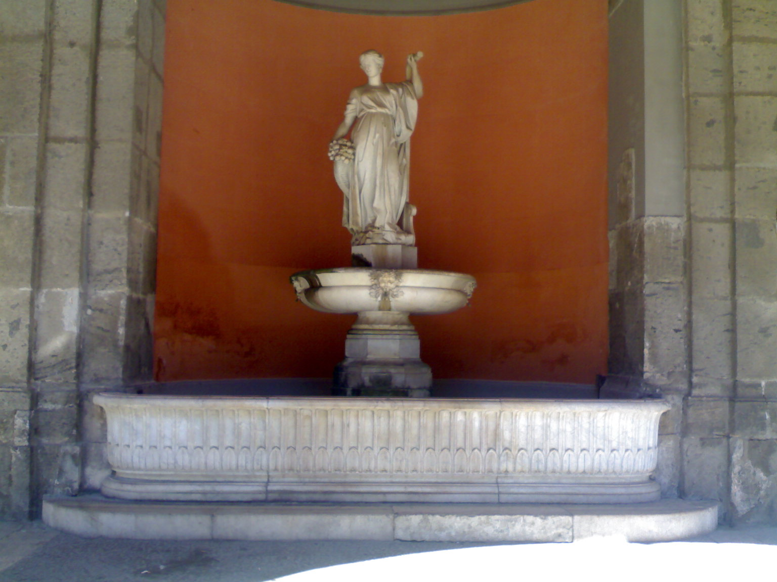 Fontana Fontana, Napoli